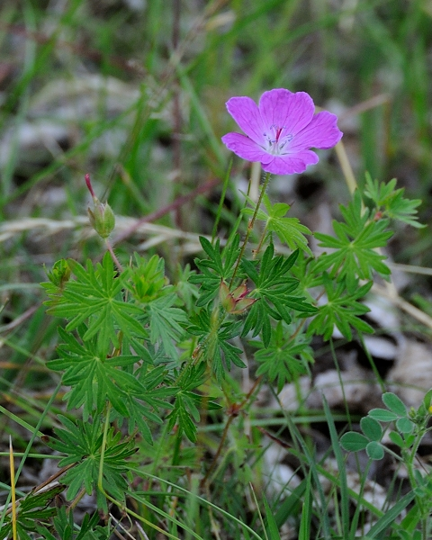 Blutroter Storchschnabel im Mainzer Sand II Aufgenommen am 01.06.2014